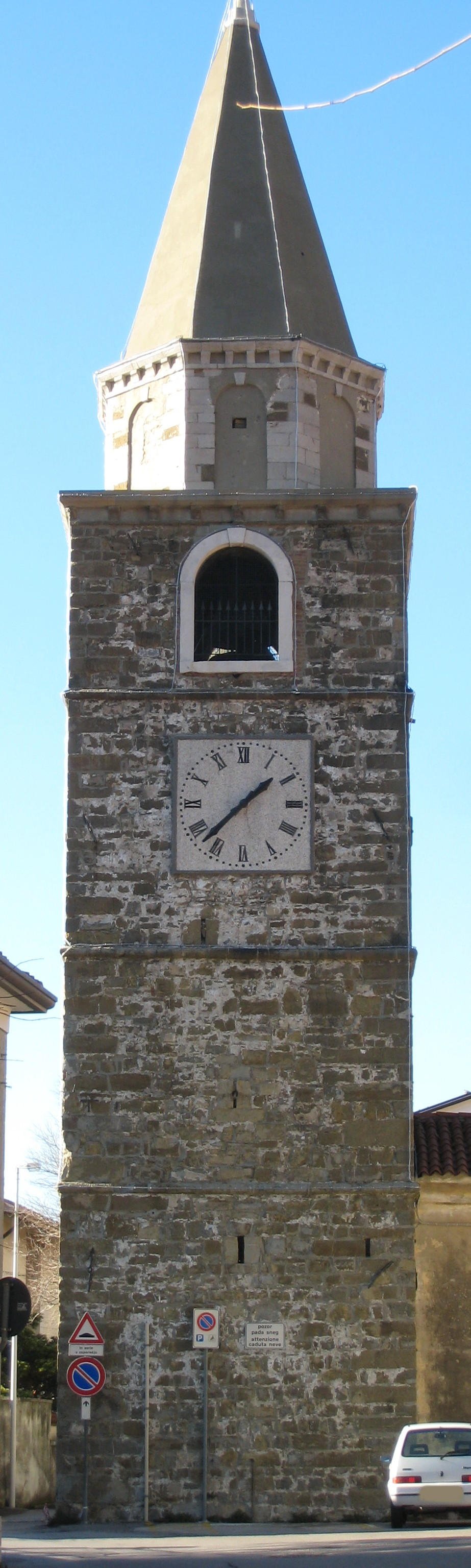 Campanile della Chiesa di Bagnoli della Rosandra (TS). Gennaio 2008